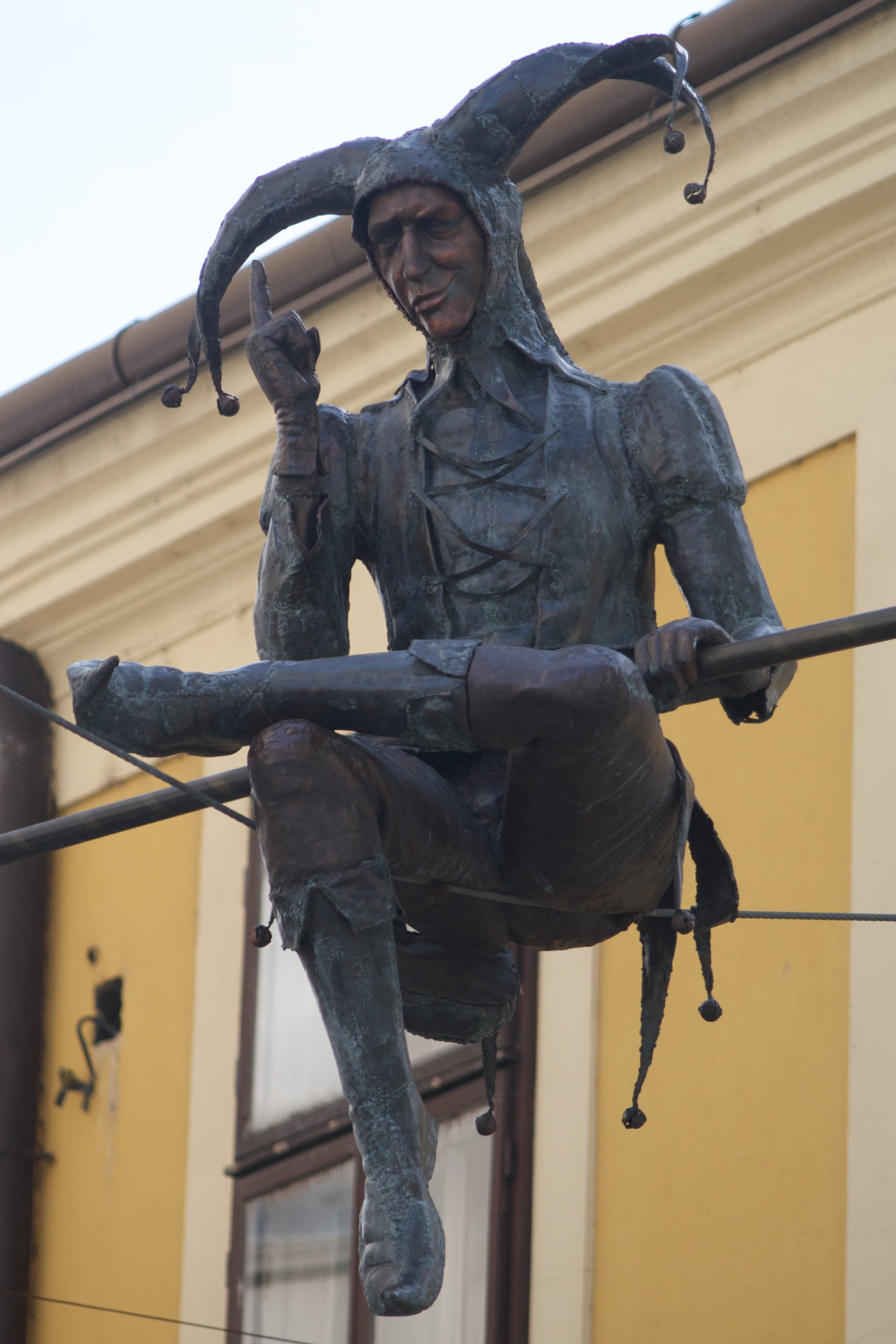 Székesfehérvár